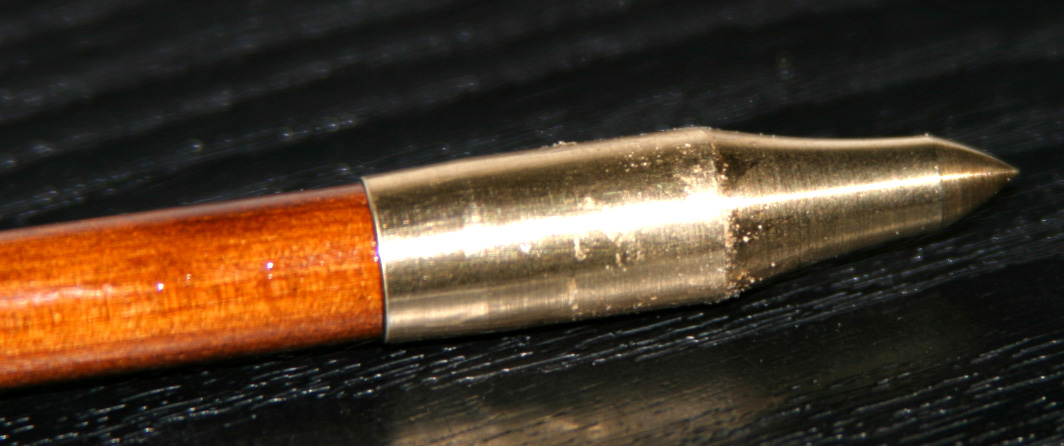 3D Messing Pfeilspitze